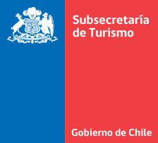 Logotipo de la Subsecretaría de Turismo